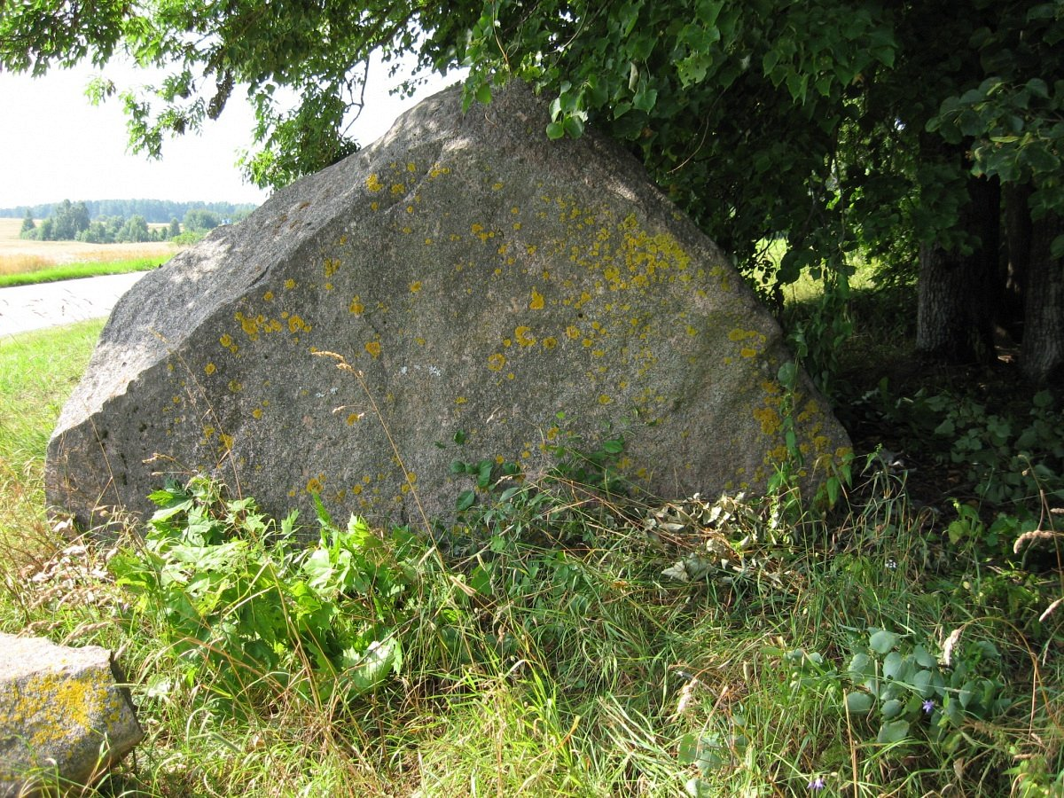 Анкудскі вялікі камень, размешчаны ў канцы вёскі Анкуды каля дарогі да станцыі Ашмяны